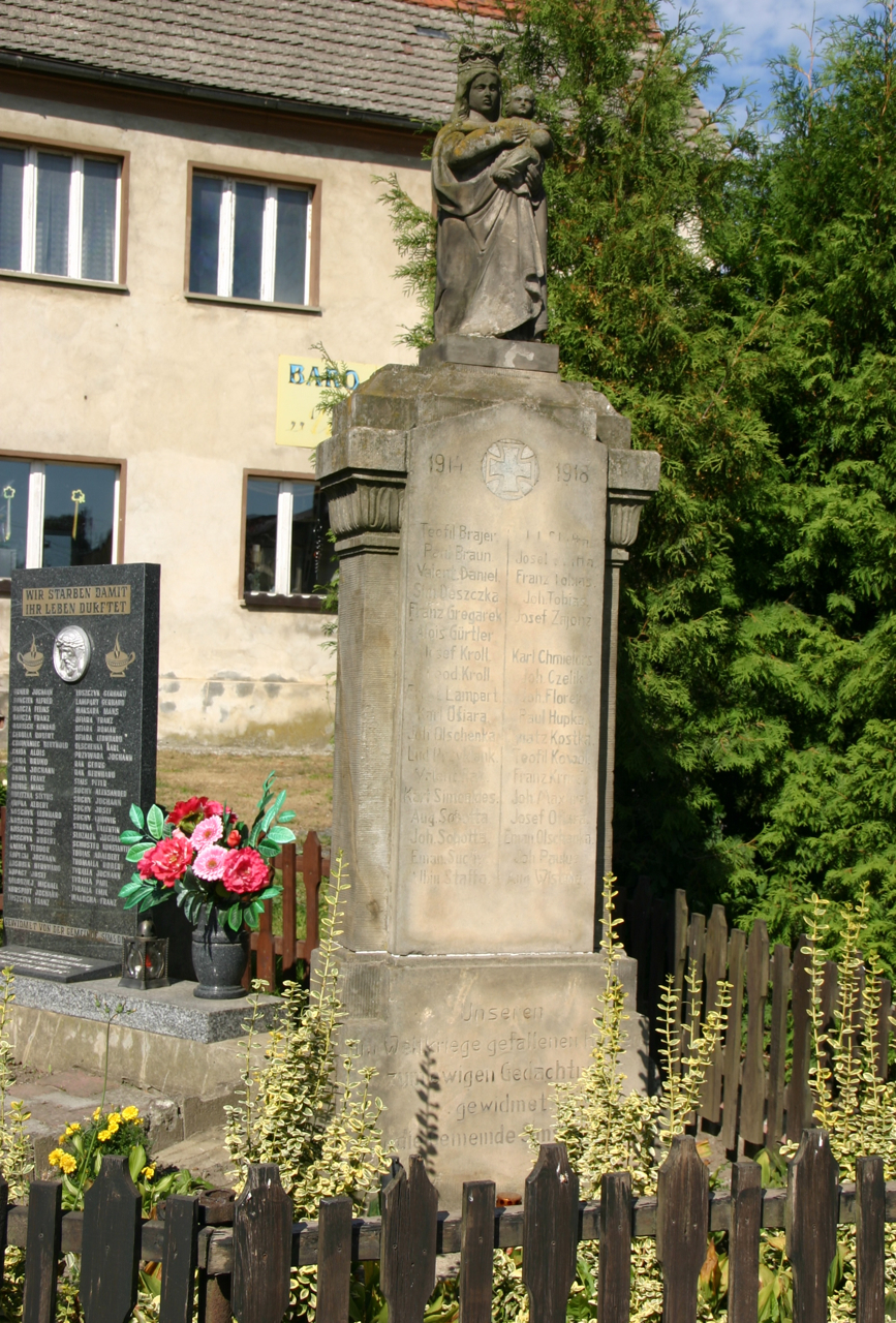 Gostomia (dodatkowa nazwa w j. niem. Simsdorf) – wieś w Polsce położona w województwie opolskim, w powiecie prudnickim, w gminie Biała.